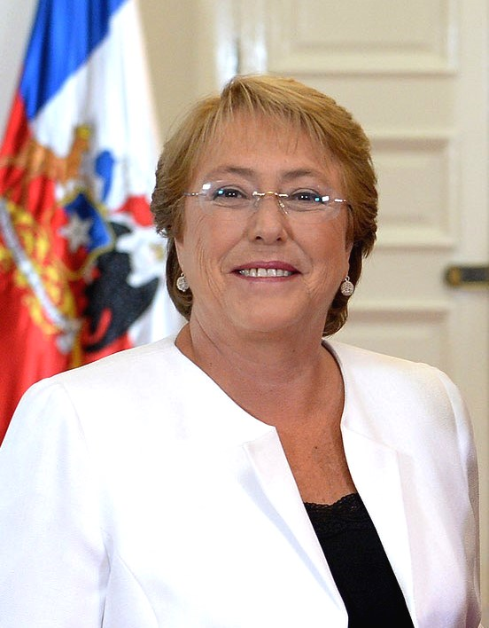 Mandataria recibe a Beatriz Paredes embajadora de México en Brasil.